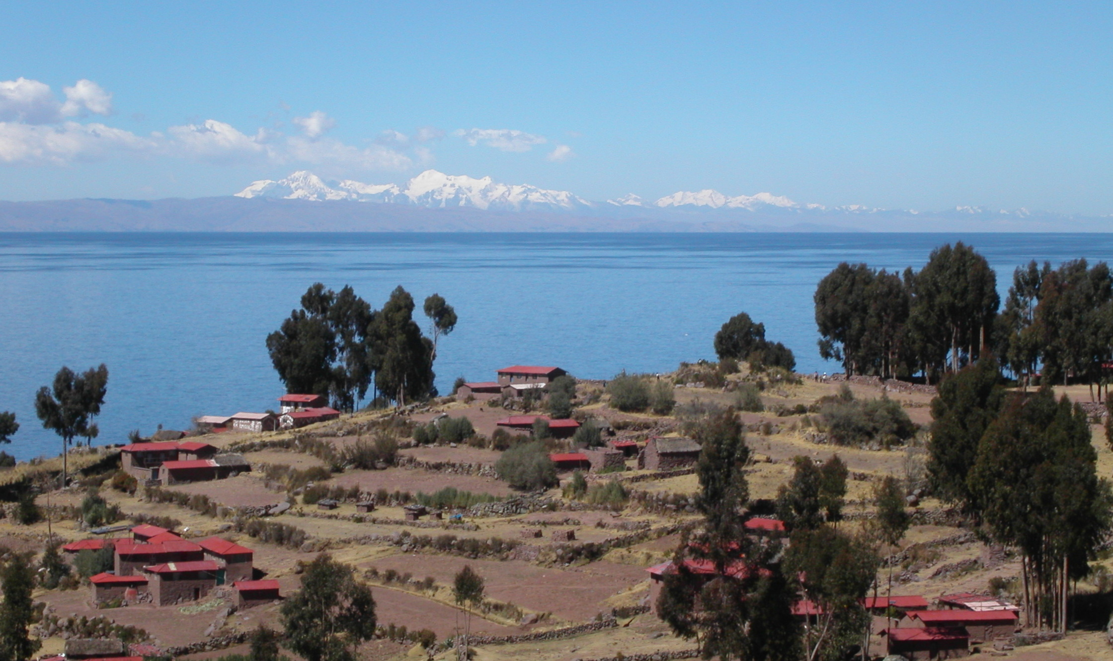 Titicacasee. Vorne: die peruanische Insel Taquile; hinten: Anden in Bolivien